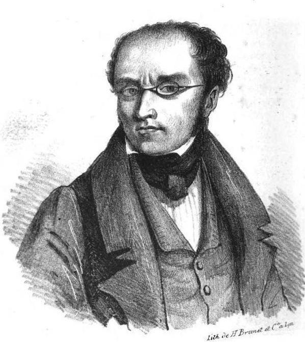 "Michel (de Bourges)".